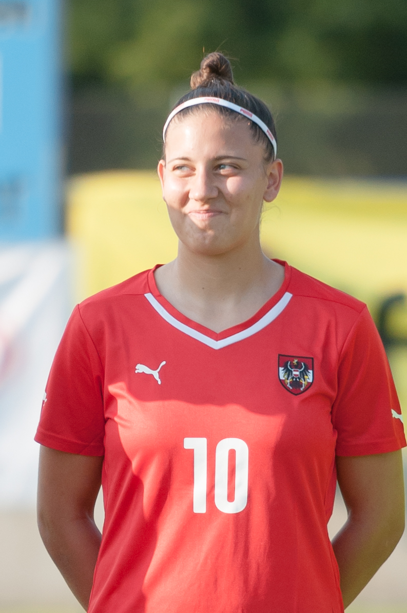 Frauenfußball U19 Testspiel Österreich - Norwegen am 12. August 2015 in Bad Erlach: Marina Georgieva